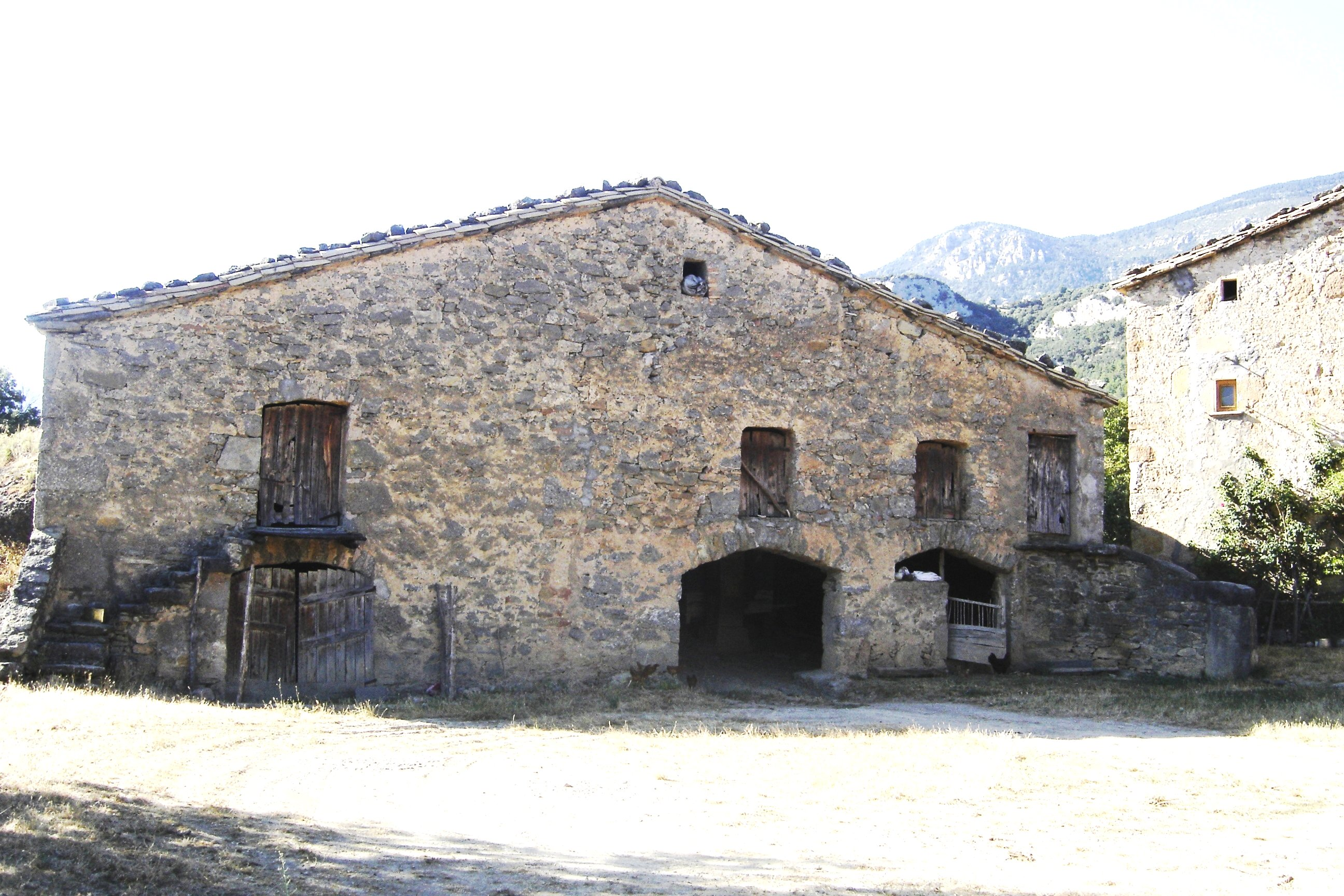 El cobert que hi ha a l'esquerra de la façana de la masia de Junyent (Odèn) (Solsonès).